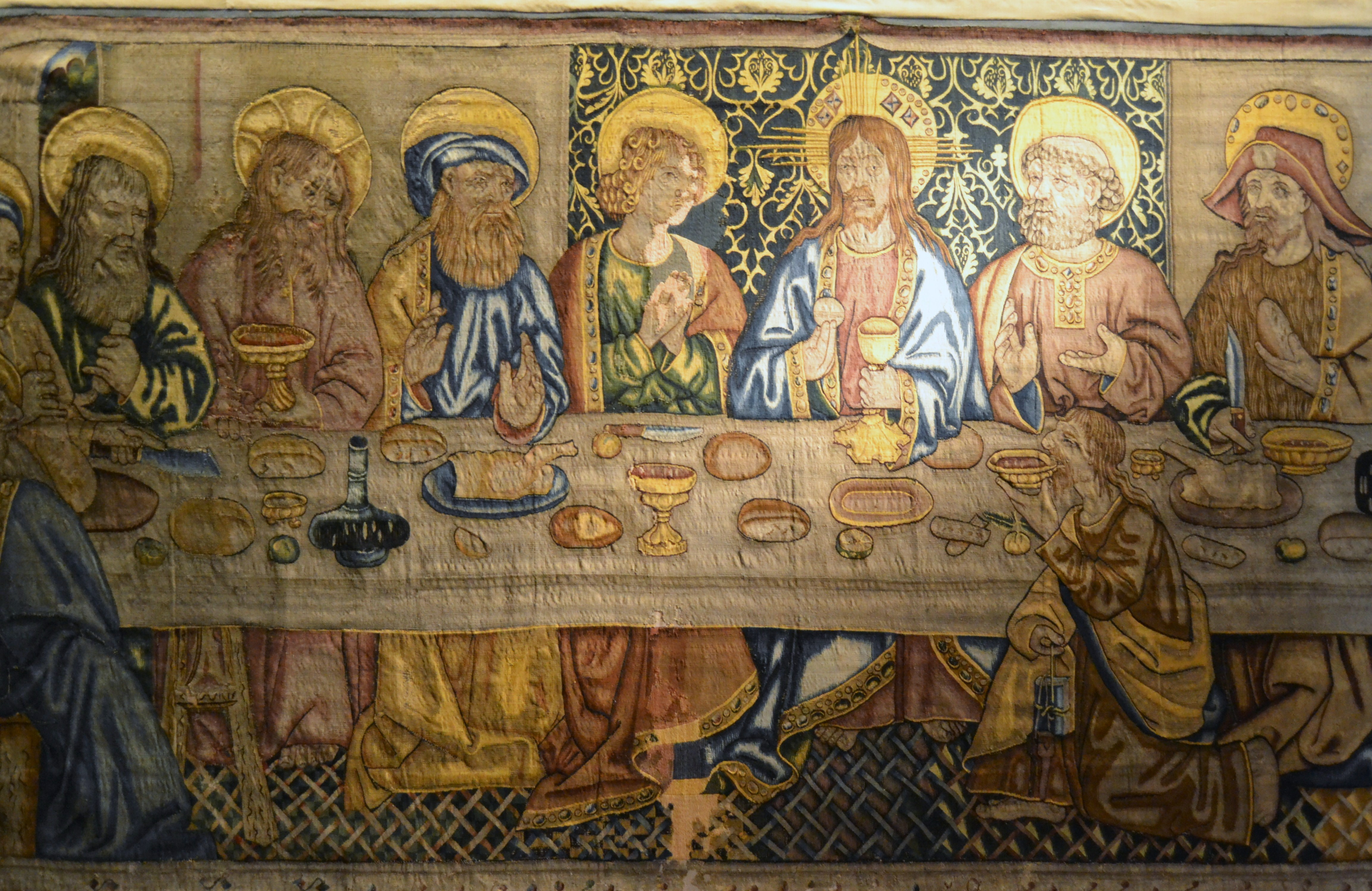 Tapís del sant Sopar, atribuït a Joan Falsison, segle XV, catedral de Tortosa.